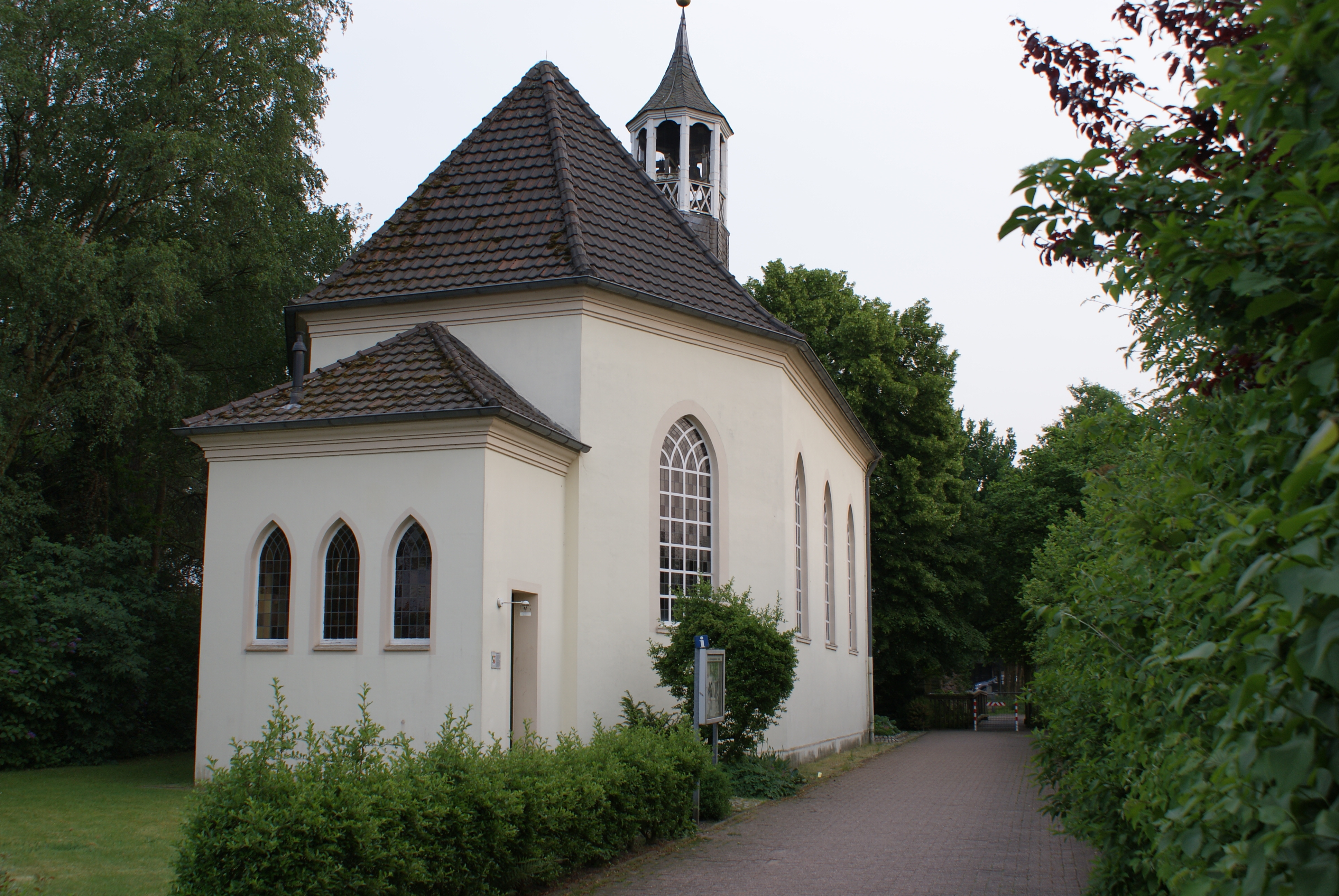 Evangelische Johanneskirche, Oeding